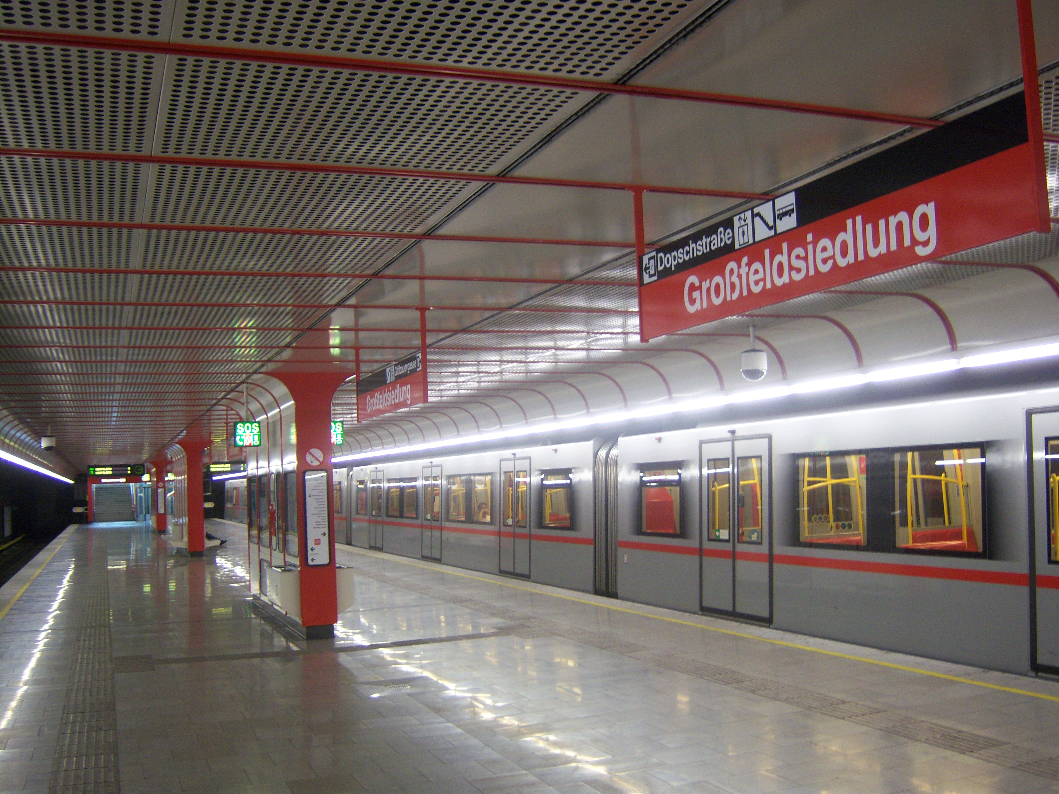 U1-Station Großfeldsiedlung